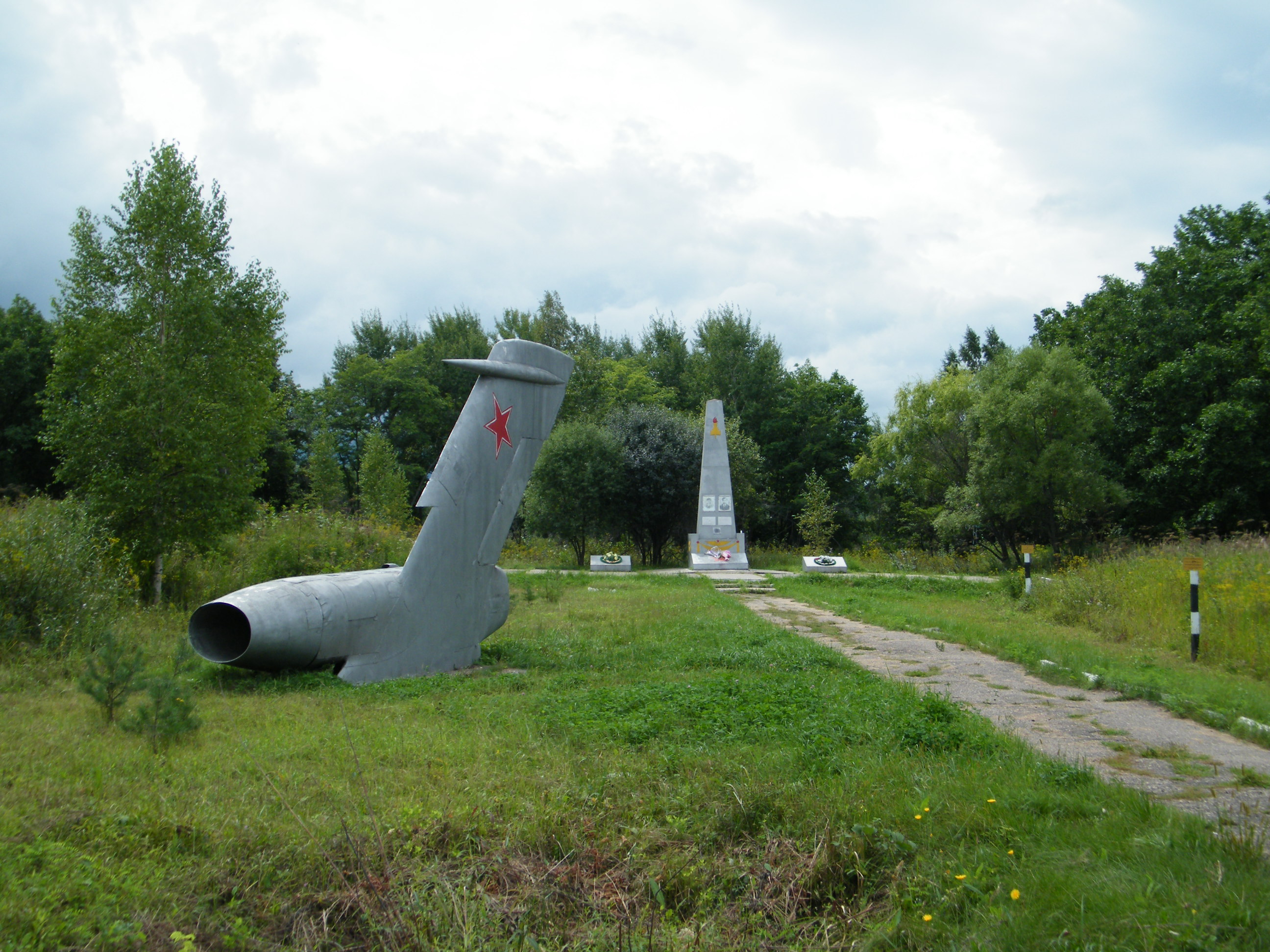 Памятник погибшим военным летчикам возле города Арсеньев. 9 сентября 1981 года майор Анашкин и капитан Волков ценой своих жизней отвели падающий самолёт Як-28 от населённого пункта.